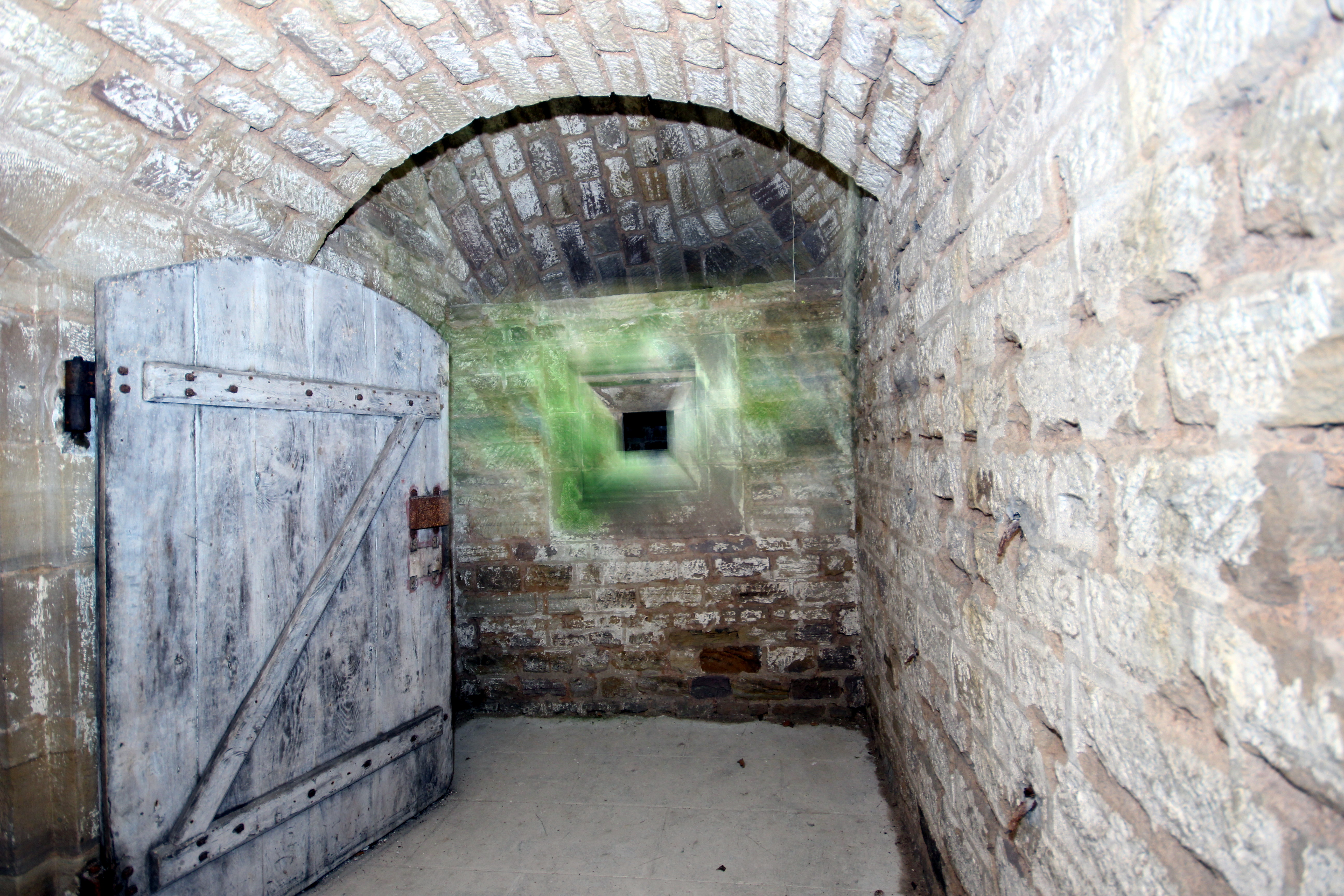 Le vestibule du magasin à poudre modèle 1874 du fort de Bois l'Abbé